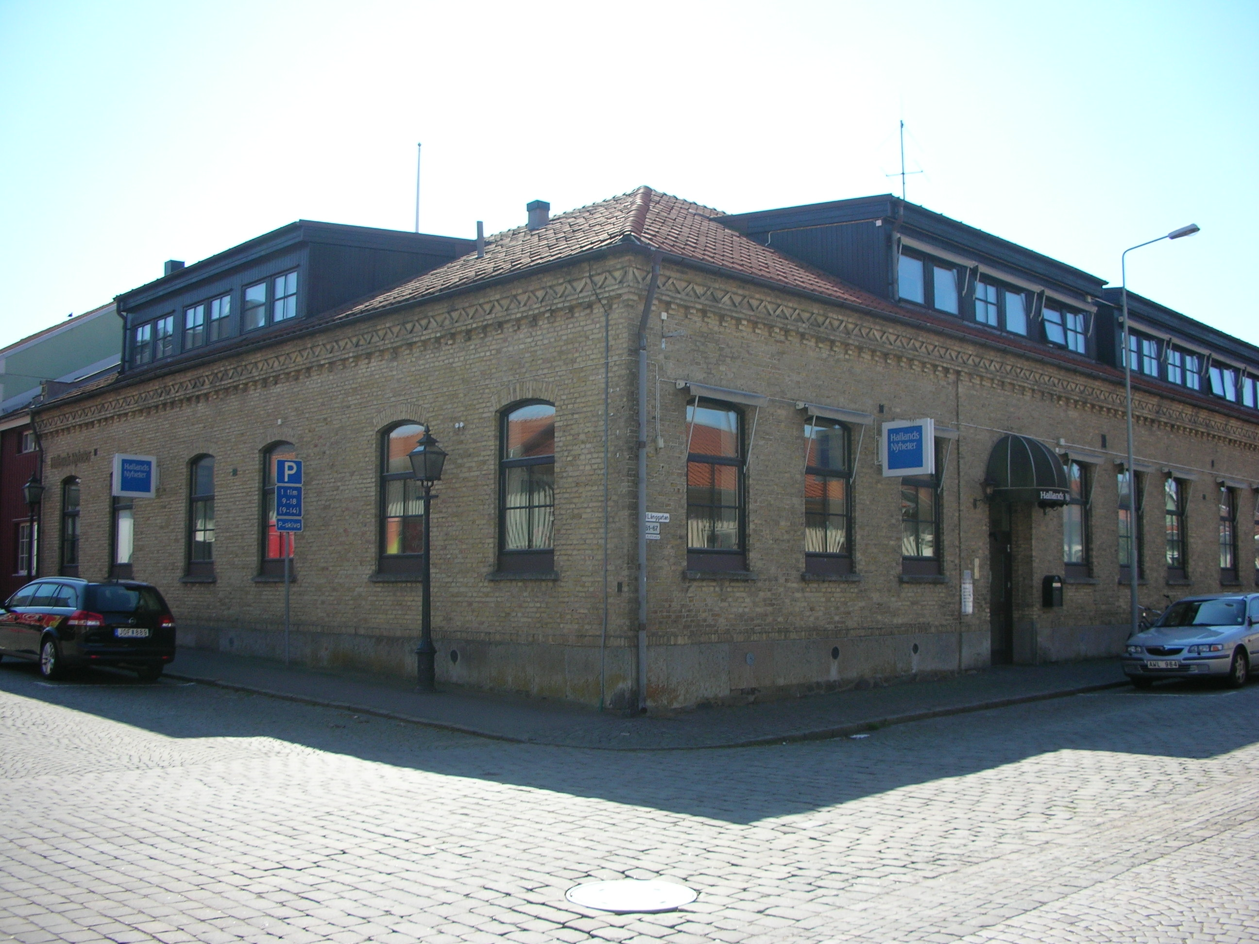 Gamla små- och folkskolan, Varberg, ritad av Frans Jacob Heilborn.